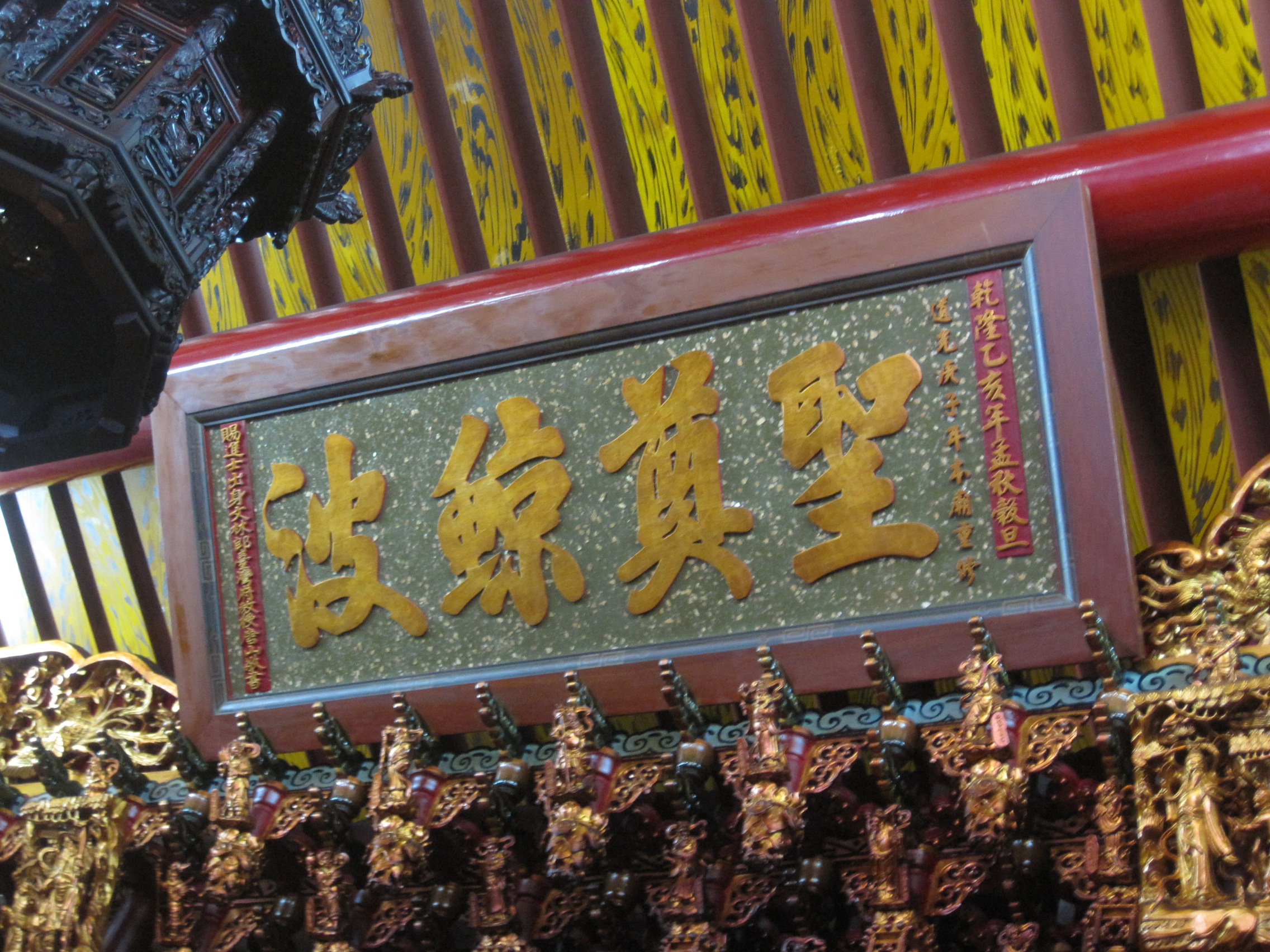 媽祖樓天后宮裡的古匾